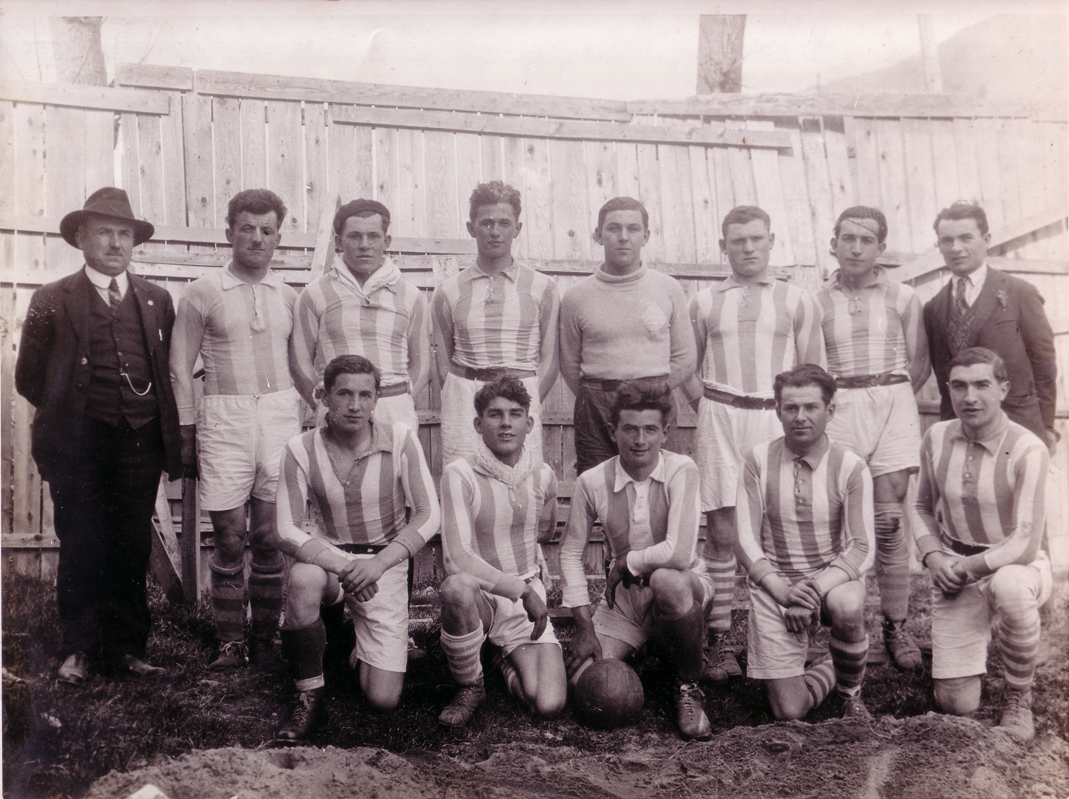 Avant-Garde de la Save : Equipe de football de Saint-Laurent (Haute-Garonne) en 1930